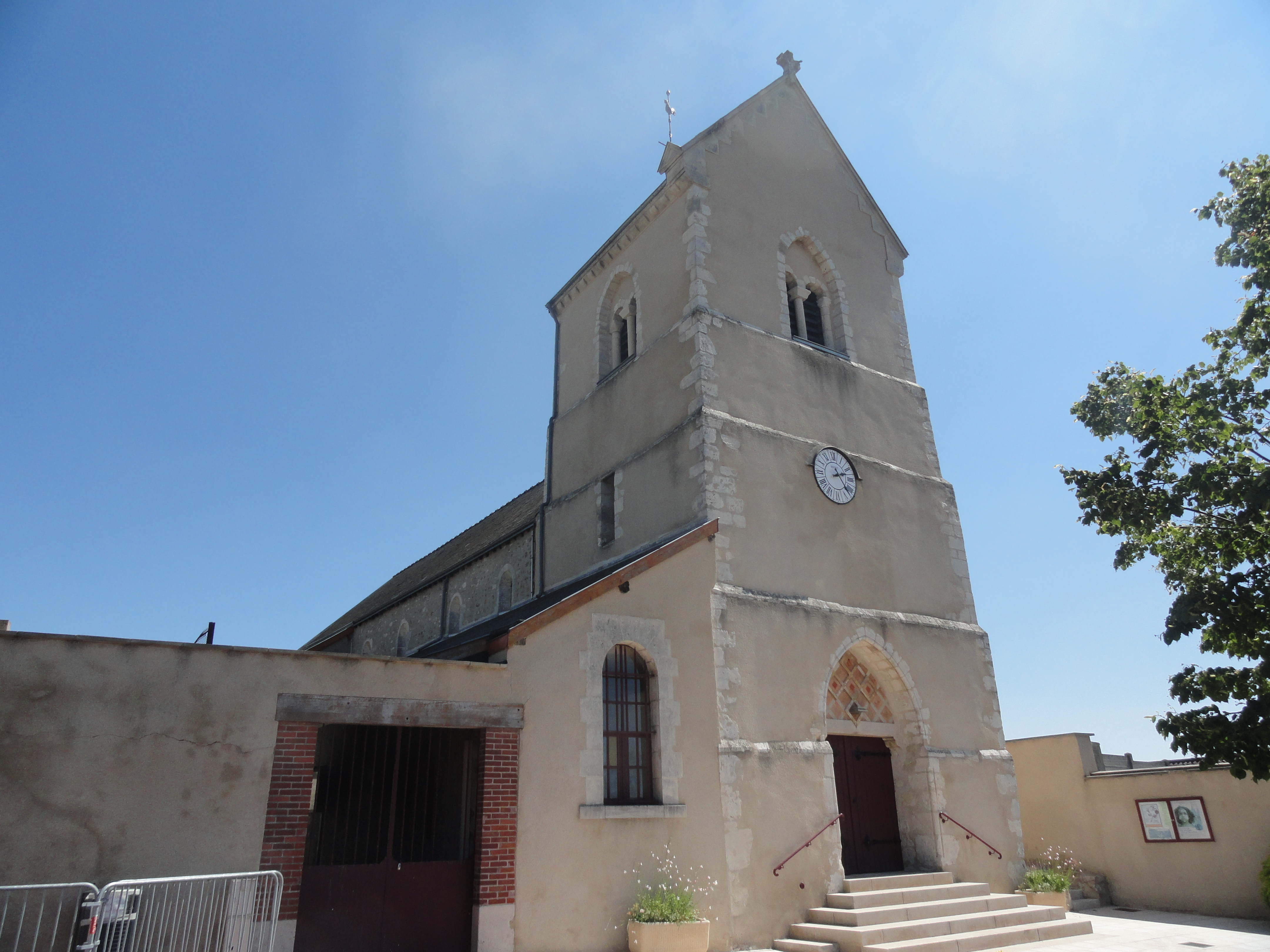 Église Saint-Timothée à Dizy dans la Marne